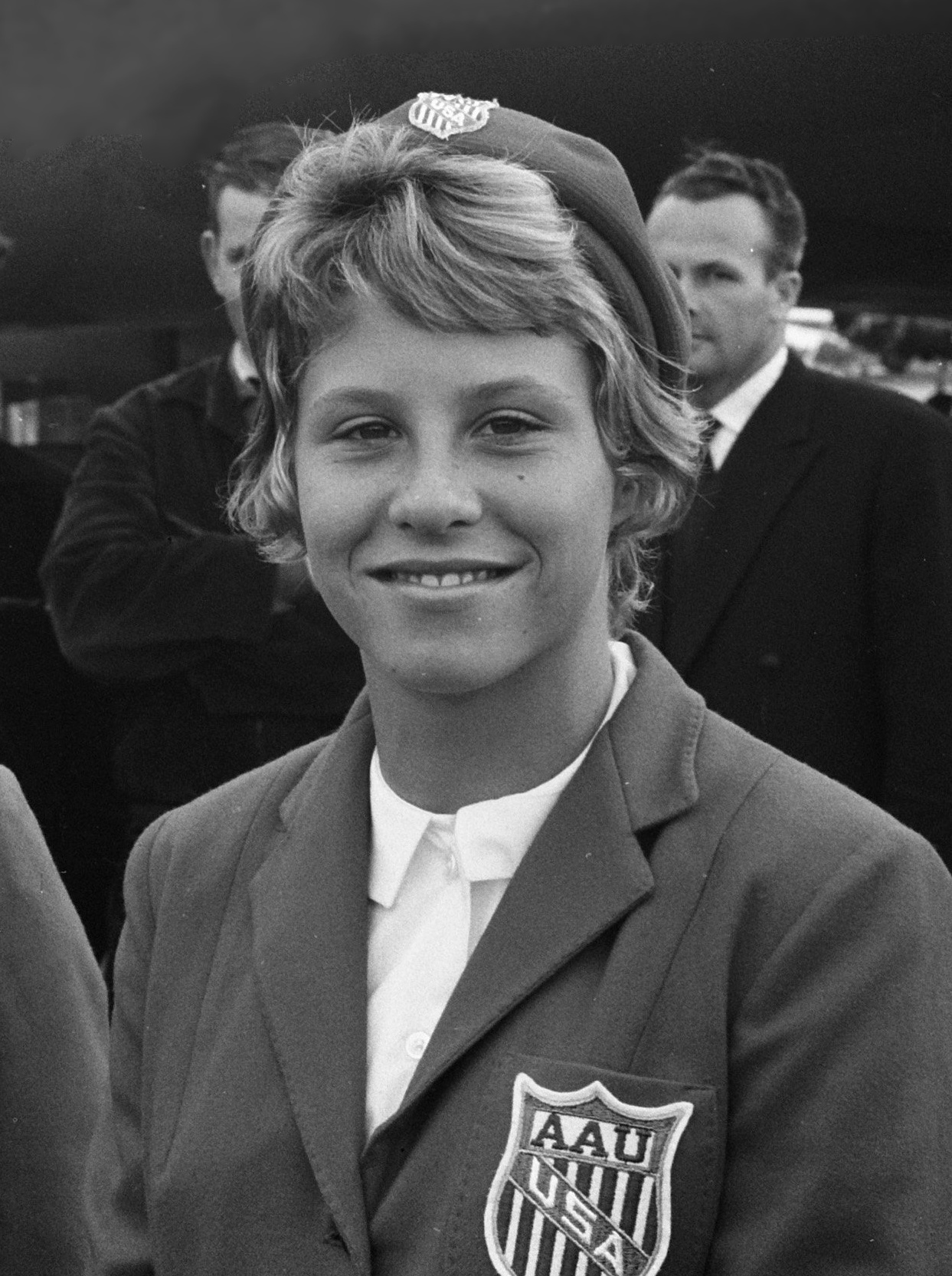 Aankomst Amerikaanse zwemploeg. X en Donna de Varona